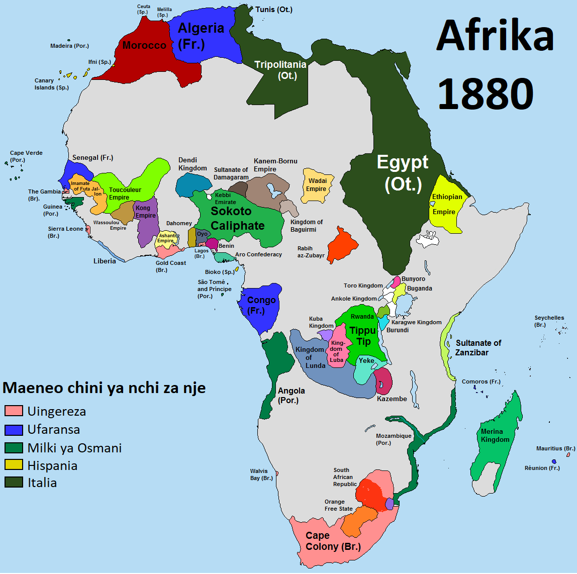 Kiswahili: Afrika 1880: milki za wenyeji na maeneo chini ya nchi za nje, kabla ya ugawaji wa Afrika kati ya wakoloni